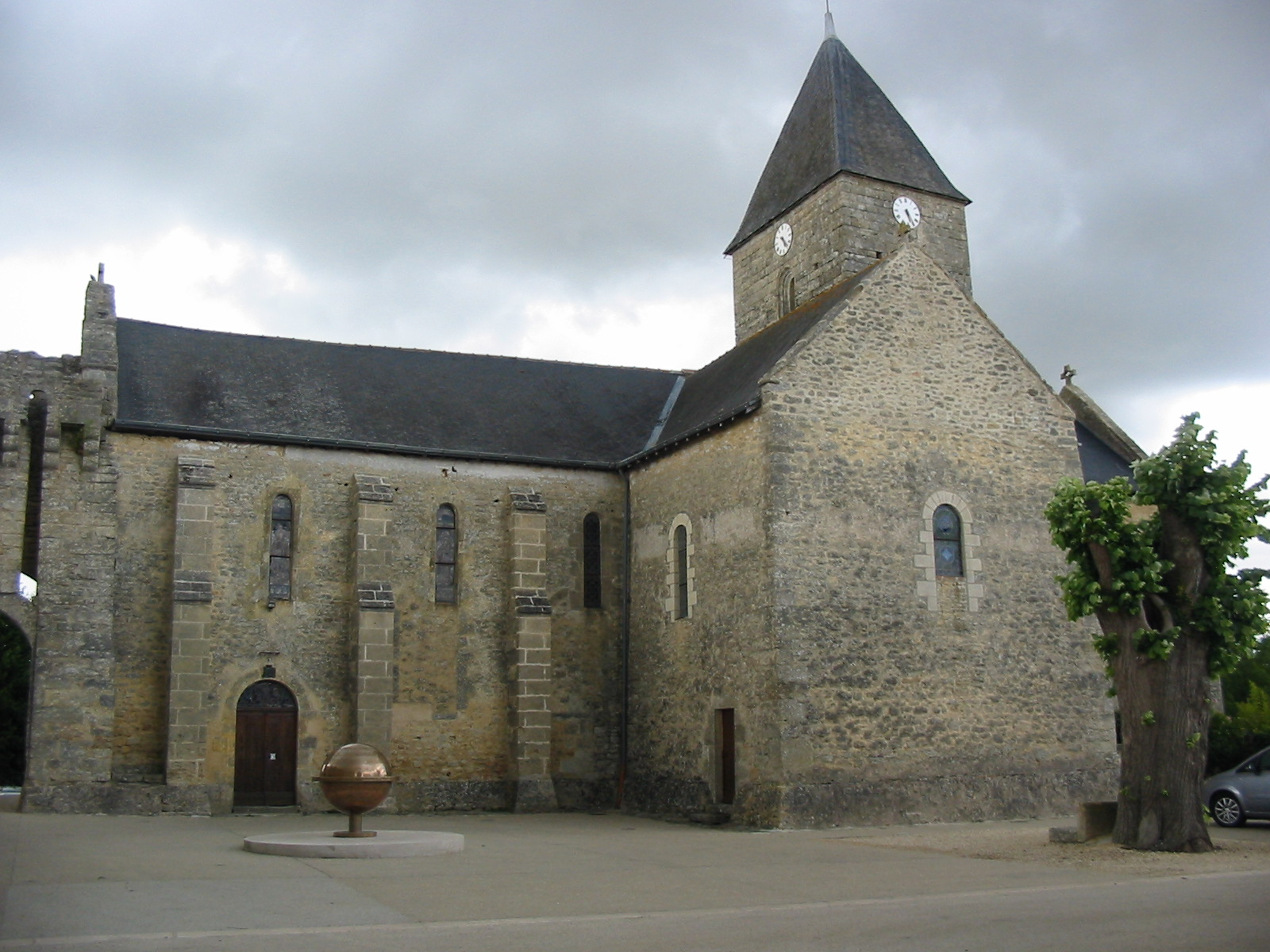 Église Saint-Denis à Aubigné-sur-Layon (Maine-et-Loire, France).